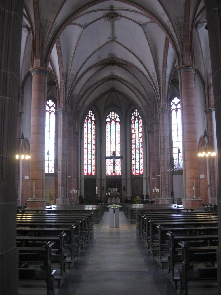 Blick durch das Hauptschiff der Propsteikirche St. Urbanus (Gelsenkirchen-Buer)